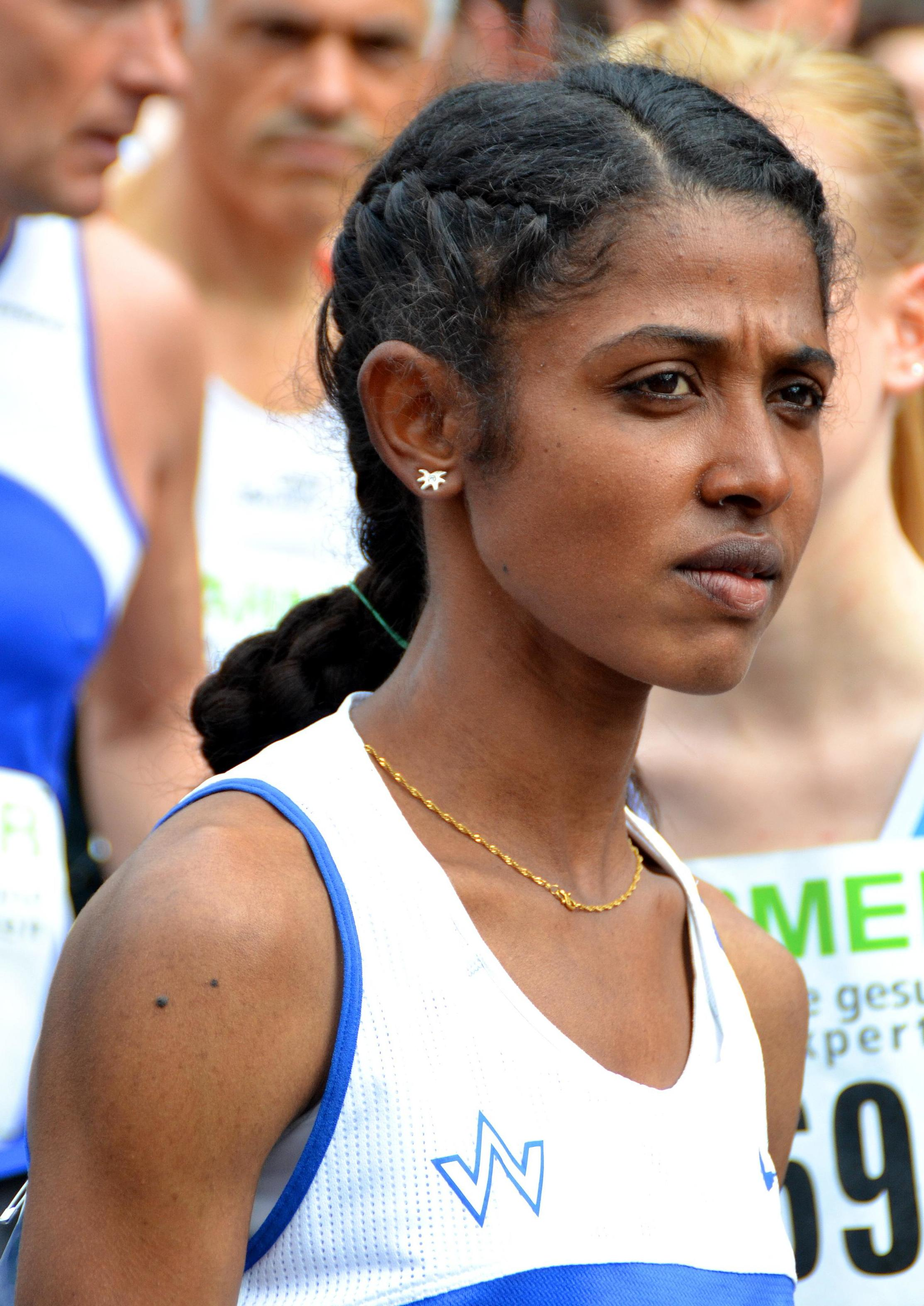 DM HM 2013 Refrath